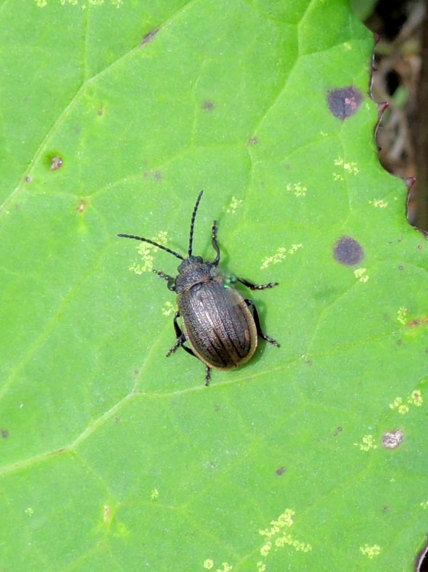 Galeruca pomonae